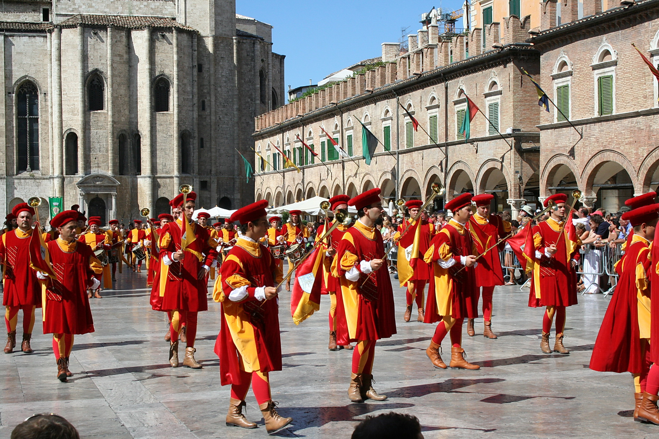 Musici con chiarine del gruppo del Comune di Ascoli Piceno, Quintana del 5 agosto 2007.